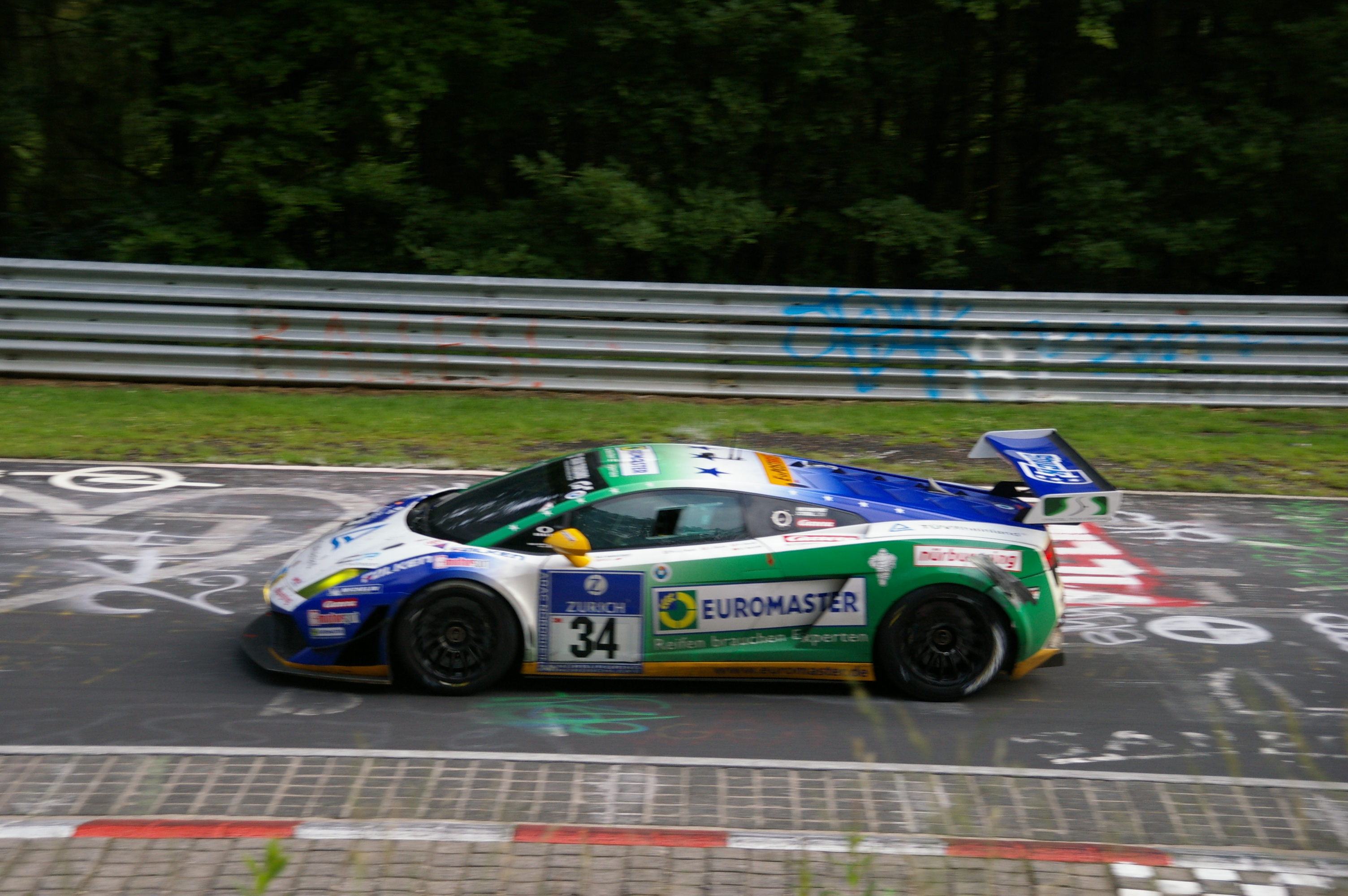 Lamborghini Gallardo LP 600+ Motor: 10 Zyl. / 5211 ccm Gewicht: 1350 kg Klasse: SP 9 GT3 Team: Reiter Engineering Fahrer: Hans-Joachim Stuck / Johannes Stuck / Ferdinand Stuck / Dennis Rostek